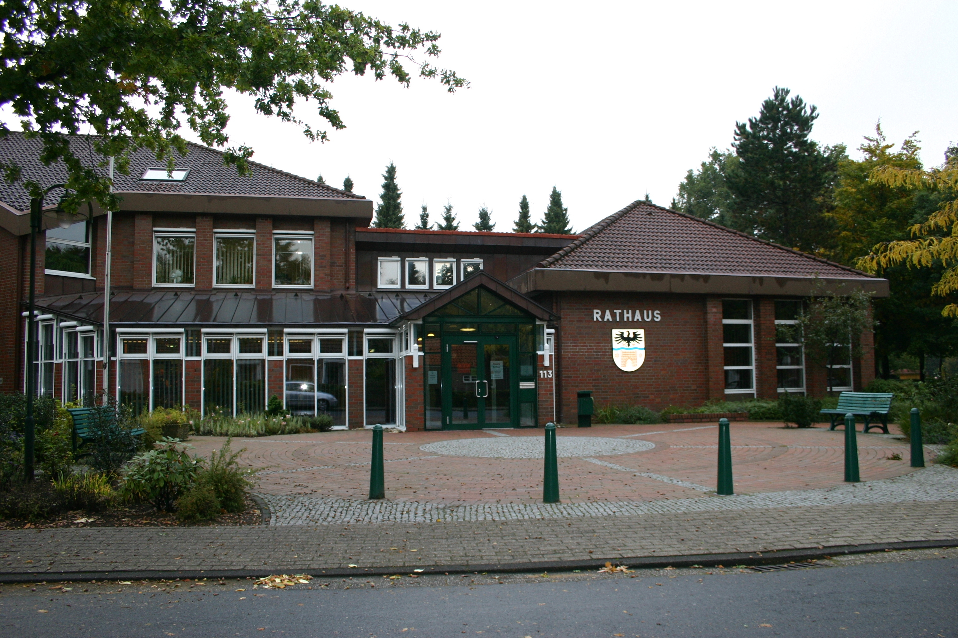 Rathaus der Gemeinde Uplengen im Ortsteil Remels